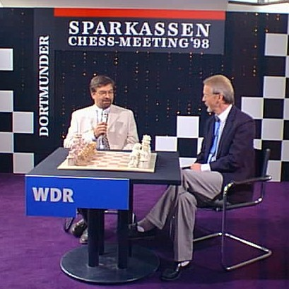 Frederic Friedel und Helmut Pfleger, Interview für WDR bei den Dortmunder Schachtagen 1998.